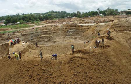 diamond mining in Kono district, Sierra Leone